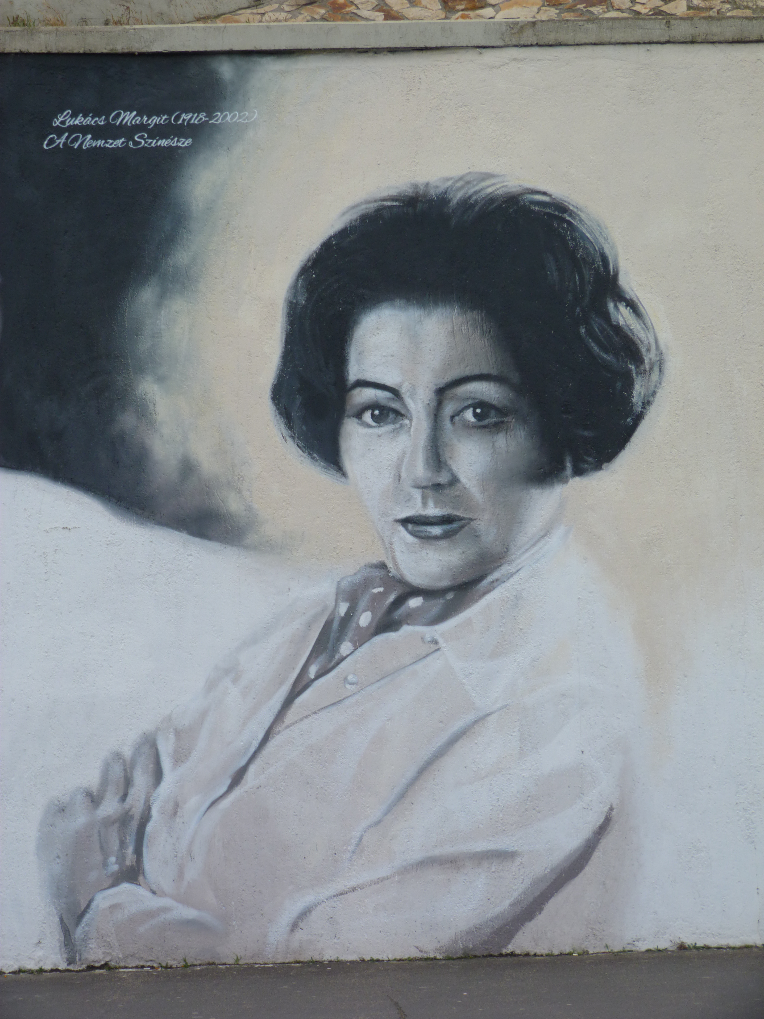 A felvétel 2012. december 3 -án, hétfőn készült Budapesten, a Rákóczi híd pesti hídfőjénél, a Nemzeti Szinháznál. Falkép (graffiti) a híd feljáróján. 2012. március 25 -én, a Nemzeti Színház megnyitásának 10. Évfordulóján adták át a nemzet színészeit ábrázoló falképet (graffiti) a Rákóczi híd pesti hídfőjénél. A Suppré-Neopaint csapat a Nemzet Színészeinek arcképeit festette meg: Agárdy Gábor, Bessenyei Ferenc, Komlós Juci, Kállai Ferenc, Garas Dezső, Lukács Margit, Sinkovits Imre, Zenthe Ferenc és Raksányi Gellért. A művelet a 2011 –ben útnak indított TűzfalRehab része, melynek keretében nagyméretű falfelületeket, tűzfalakat festenek le. A Nemzet Színészei: Koncepció, kivitelezés: Suppré-Neopaint Szakmai partner: Nemzeti Színház - A festéket biztosította: Trilak Festékgyártó Kft. 2012. Források: Cimkék: falkép graffiti suppré-neopaint Tűzfral/Rehab